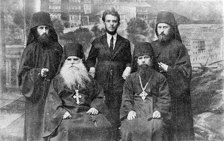 Стоят: Василий (Кривошеин), Дмитрий Шаховской, Софроний (Сахаров). Сидят: духовник монастыря схиархимандрит Кирик (Максимов) и иеромонах Тихон (Троицкий), впоследствие архиепископ. Афон, 1926 г.